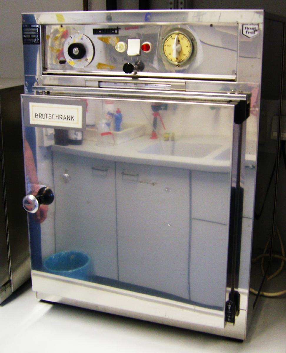 Inkubator